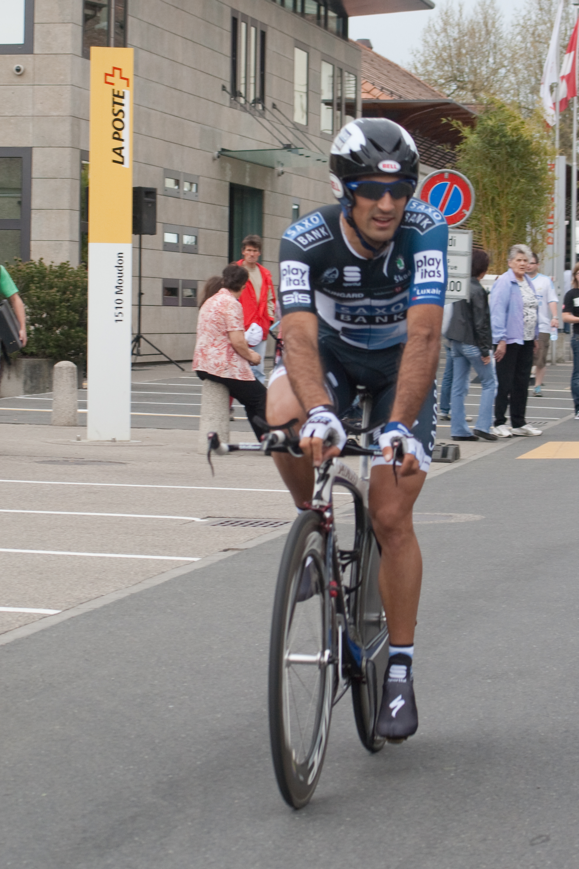 Lucas Sebastián Haedo, troisième étape du Tour de Romandie 2010.